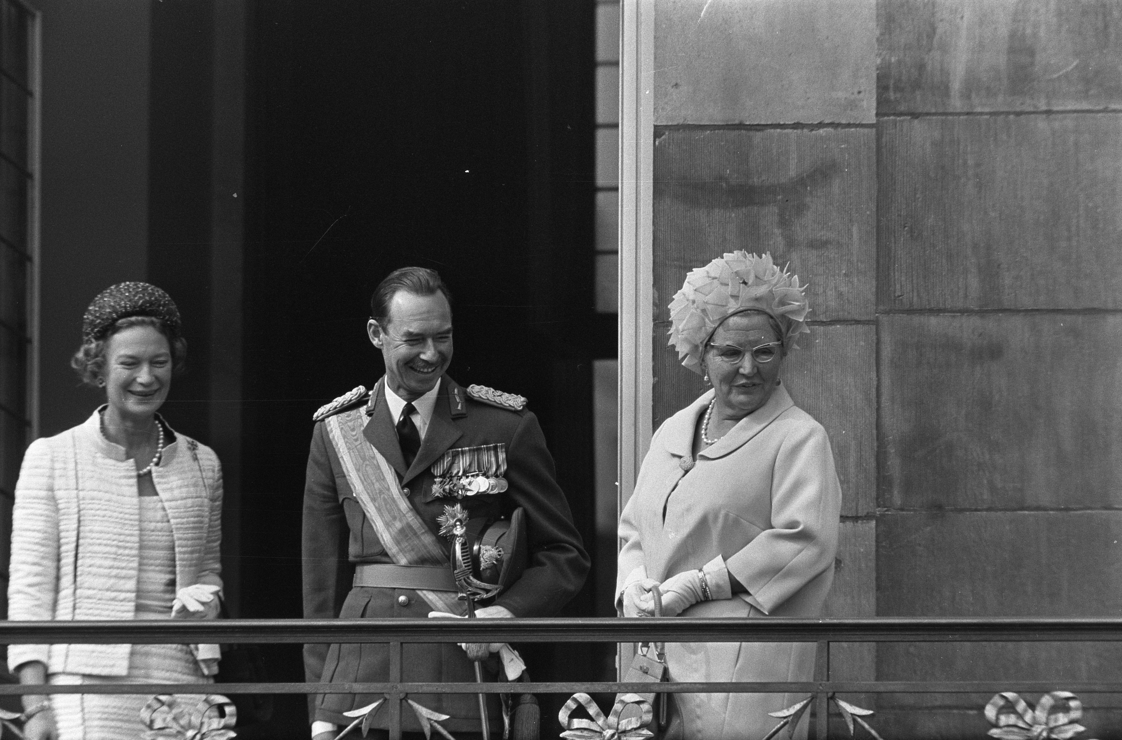 Collectie / Archief : Fotocollectie Anefo Reportage / Serie : [ onbekend ] Beschrijving : Staatsbezoek Groothertog en Groothertogin Luxemburg aan ons land. De koninklijke gasten op balkon, lachen om chauffeur die koffertje liet vallen Datum : 12 september 1967 Trefwoorden : GASTEN, Groothertoginnen, LACHEN, groothertogen, staatsbezoeken Fotograaf : Kroon, Ron / Anefo Auteursrechthebbende : Nationaal Archief Materiaalsoort : Negatief (zwart/wit) Nummer archiefinventaris : bekijk toegang 2.24.01.05 Bestanddeelnummer : 920-6926 Reacties Geplaatst door Maaike op 17 juli 2013 - 20:44. Persoonsnamen: Groothertogin van Luxemburg, Josephine Charlotte; Groothertog van Luxemburg, Jan; Juliana, koningin Locatie: Koninklijk Paleis Plaats: Amsterdam; Noord-Holland